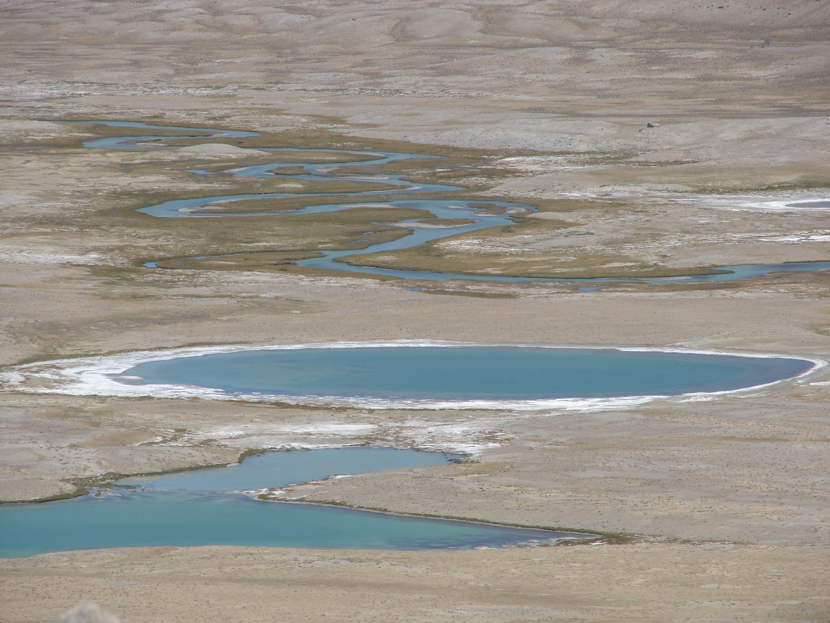 Lac salé dans la vallée du Panch, massif du Wakhan (Afghanistan) - Photographie prise du sommet de la pointe Louis Meunier